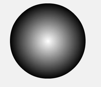 Átomo de Dalton